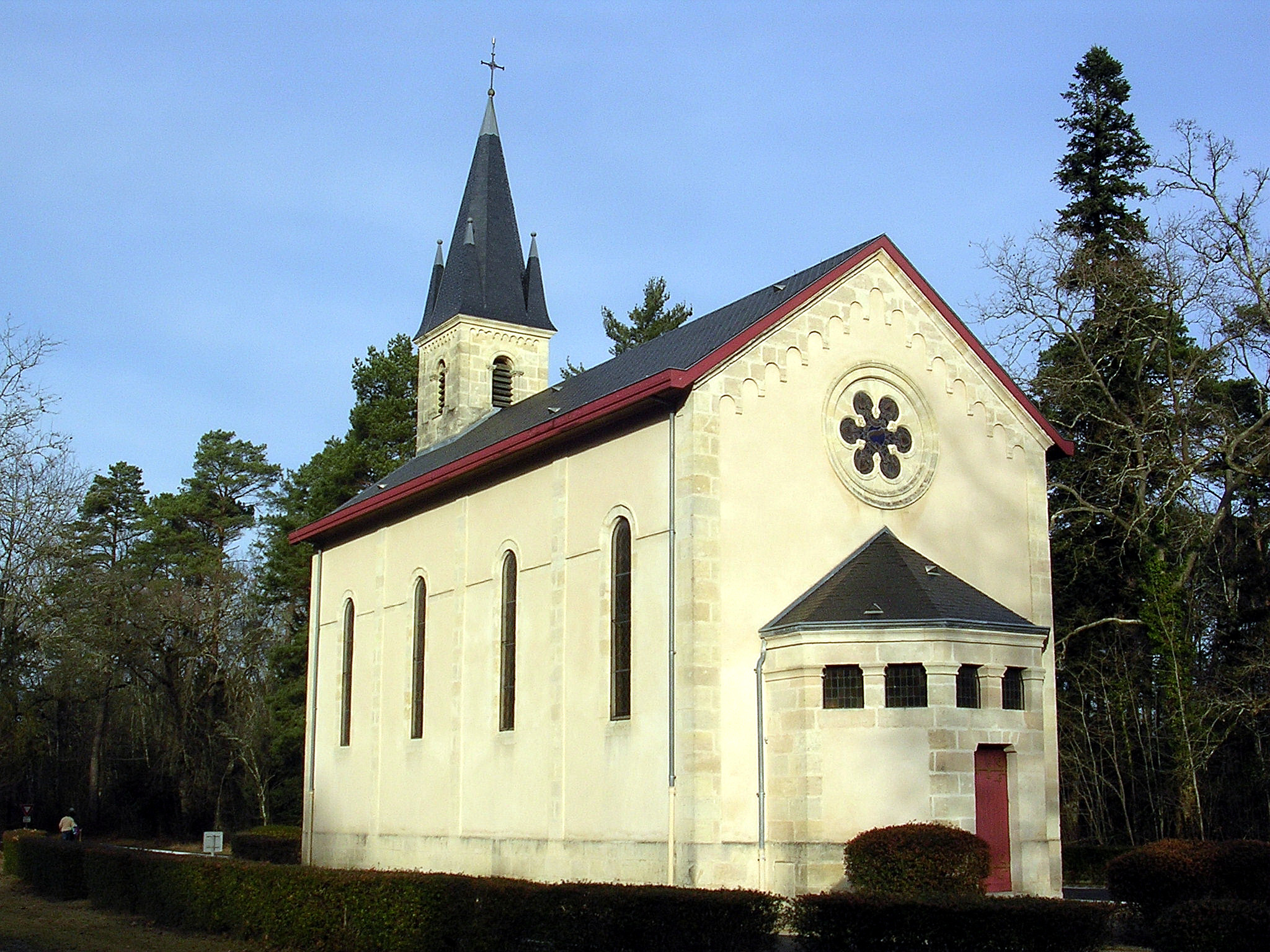 Chapelle de Solférino, dans le département français des Landes